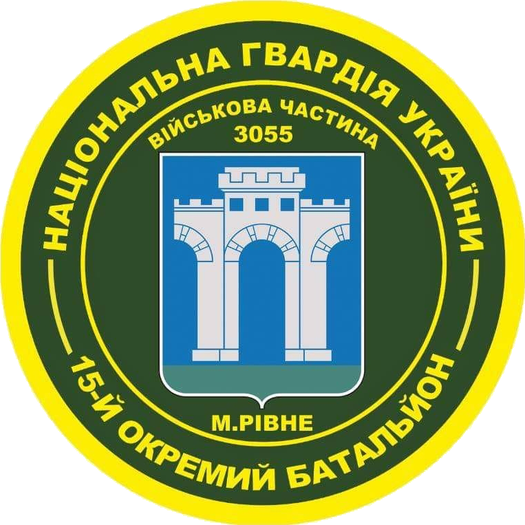 Нарукавний знак, 15 окремий батальйон, Національна гвардія України